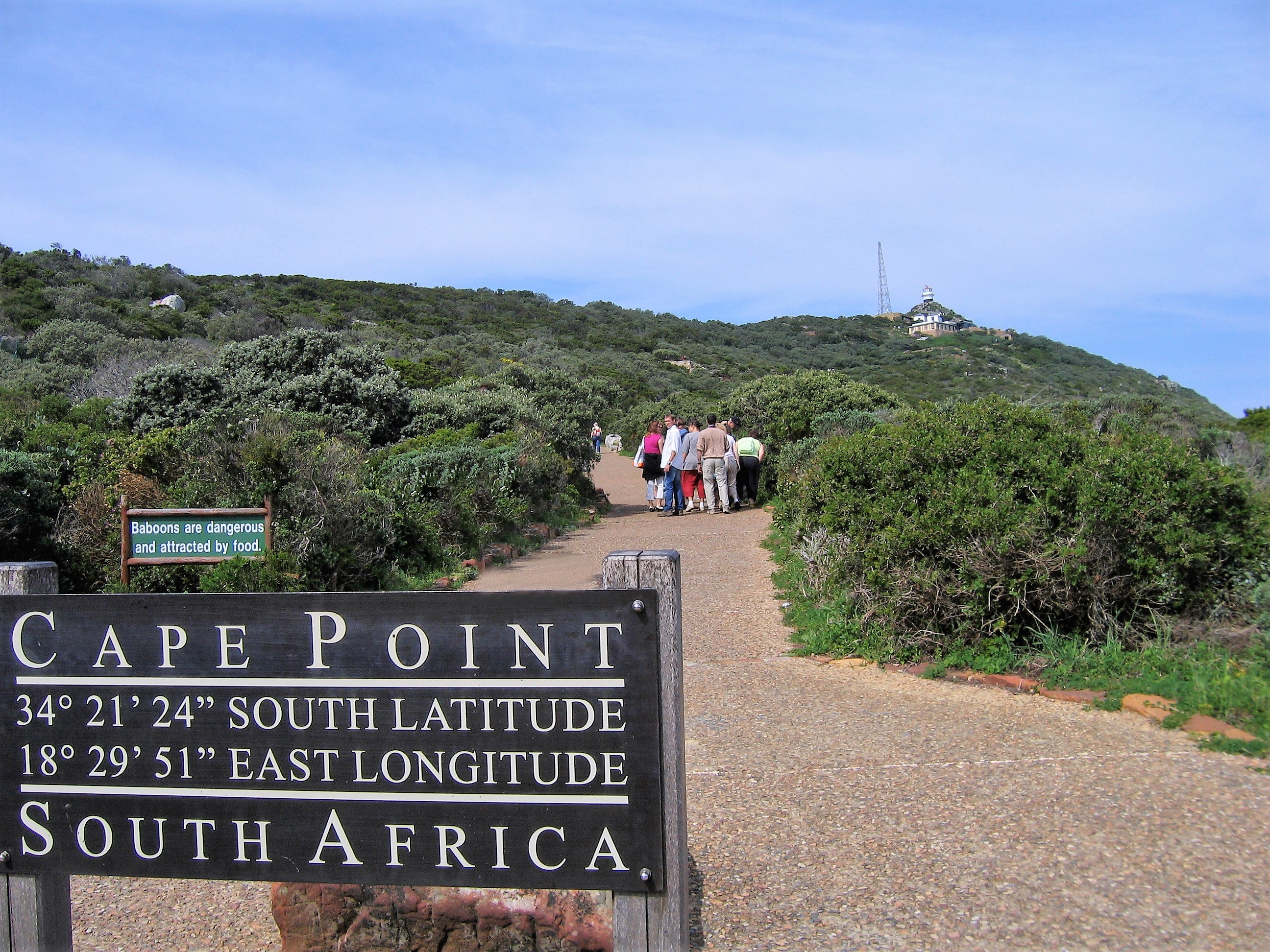 Cap de Bonne-Espérance en Péninsule du Cap , Afrique du Sud This is an image with the theme "Africa on the Move or Transport" from: South Africa